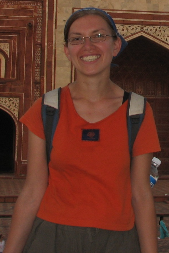 Sivan Beskin